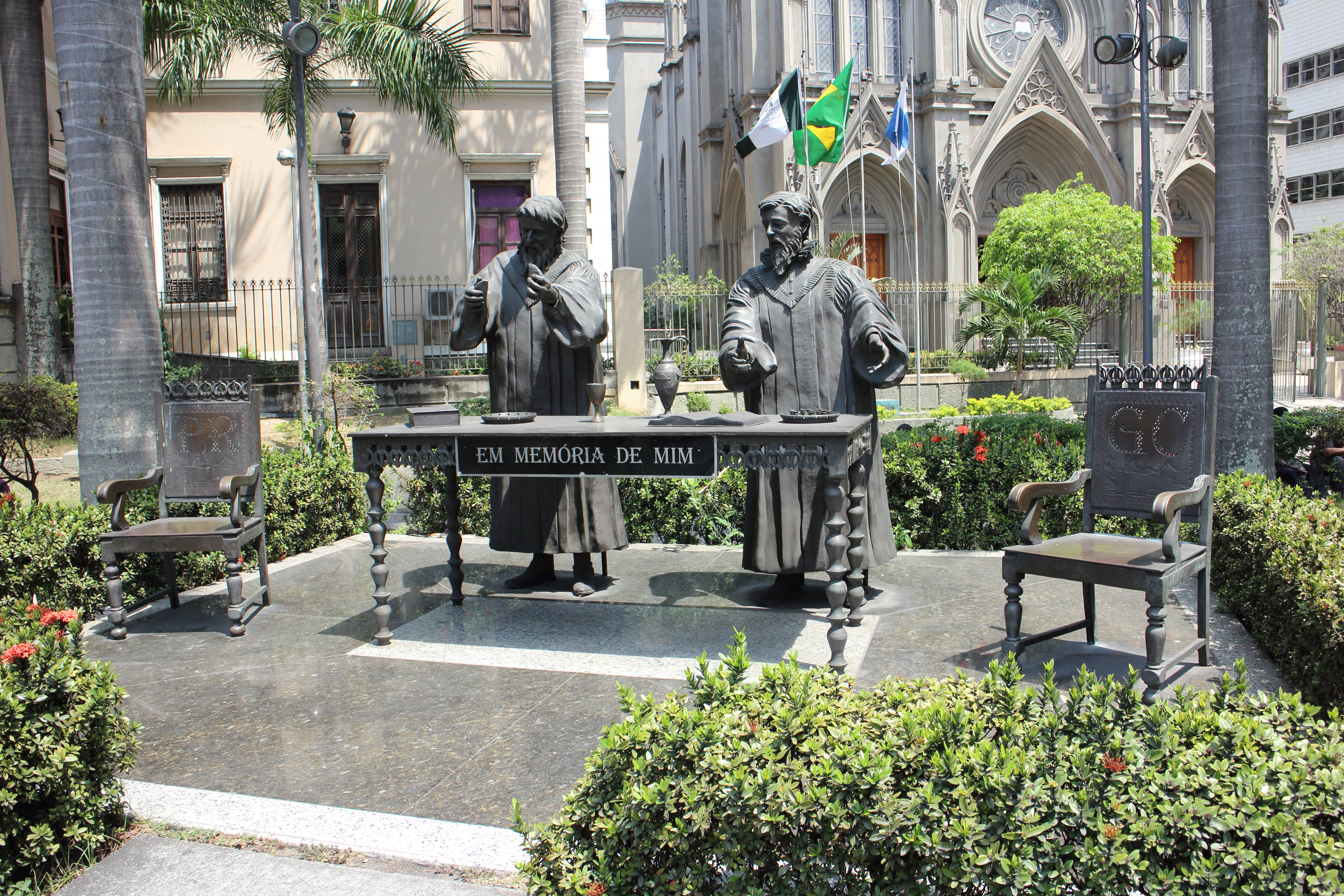 Monumento escultórico alusivo aos 450 anos do Primeiro Culto Protestante / Calvinista no Brasil e nas Américas, com a Celebração da Santa Ceia do Senhor, ocorrido em 21 de março de 1557, e celebrado no dia 24 de março de 2007.